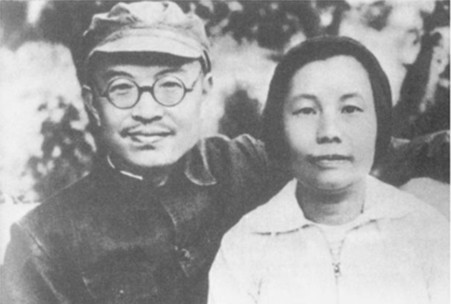 中文（中国大陆）: 1935年，张闻天与刘英结婚